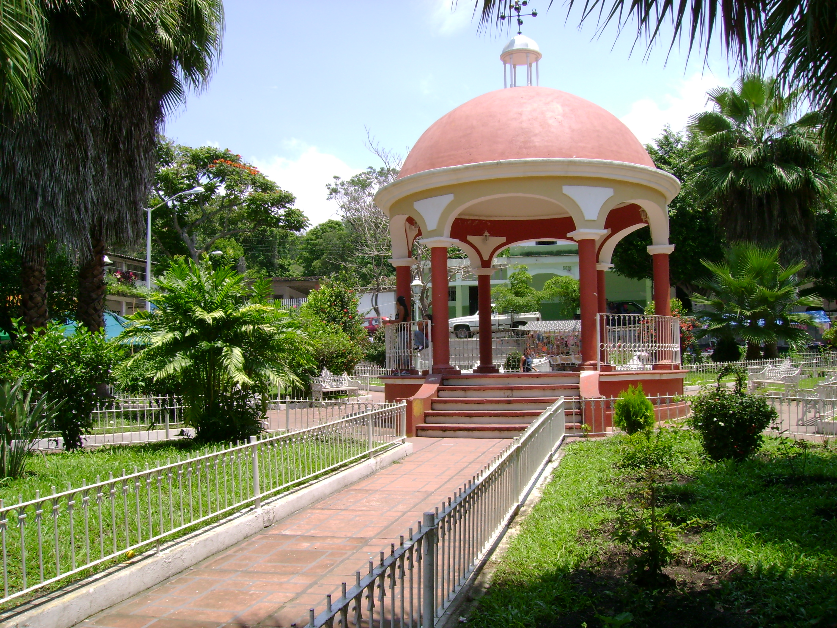 Fotografía del kiosko de Suchitlán; poblado en el estado de Colima